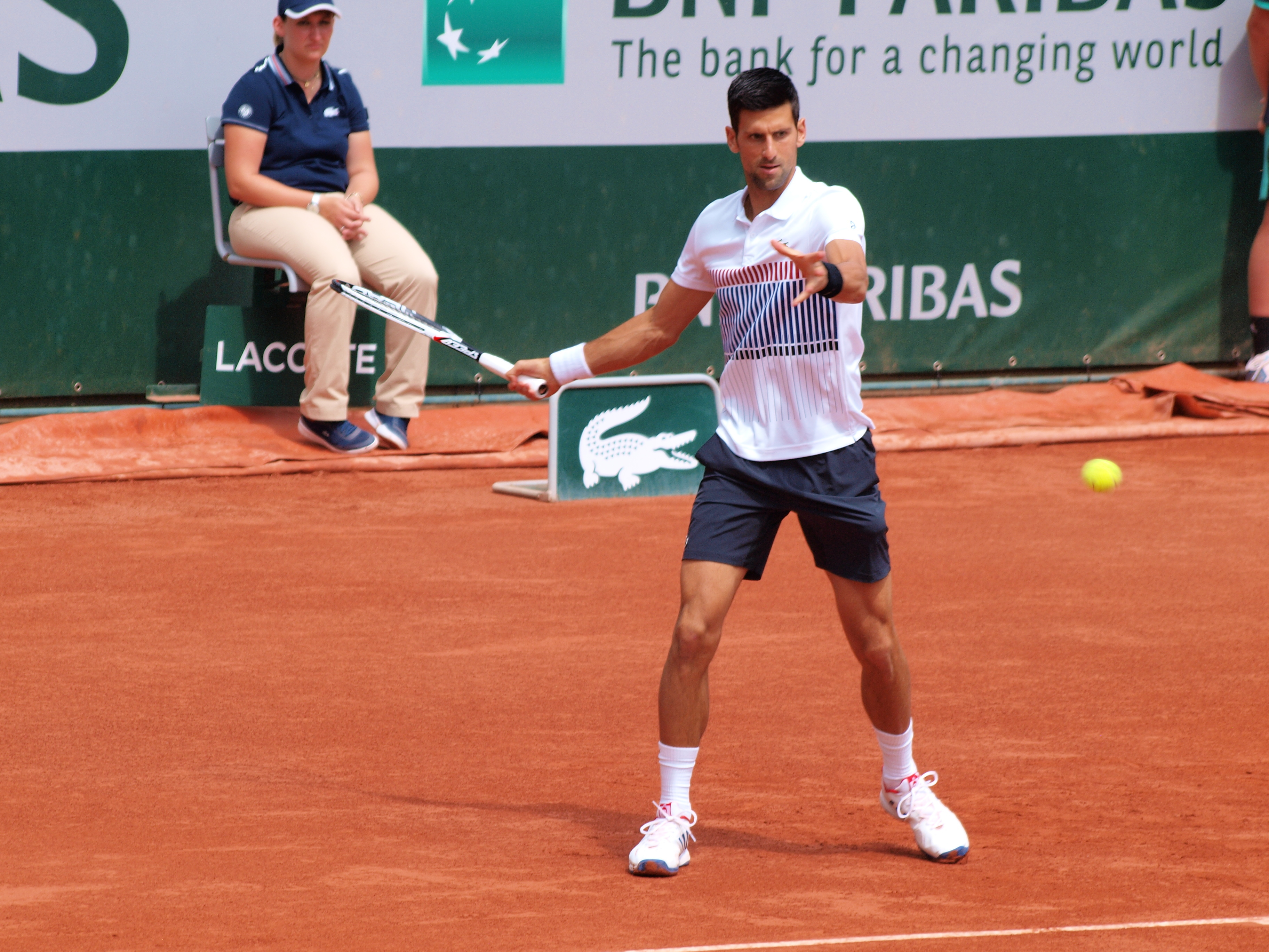 Novak Djokovic, le 2 juin 2017, aux Internationaux de France de Paris, sur le stade Roland Garros, dans son match contre Diego Schwartzman.